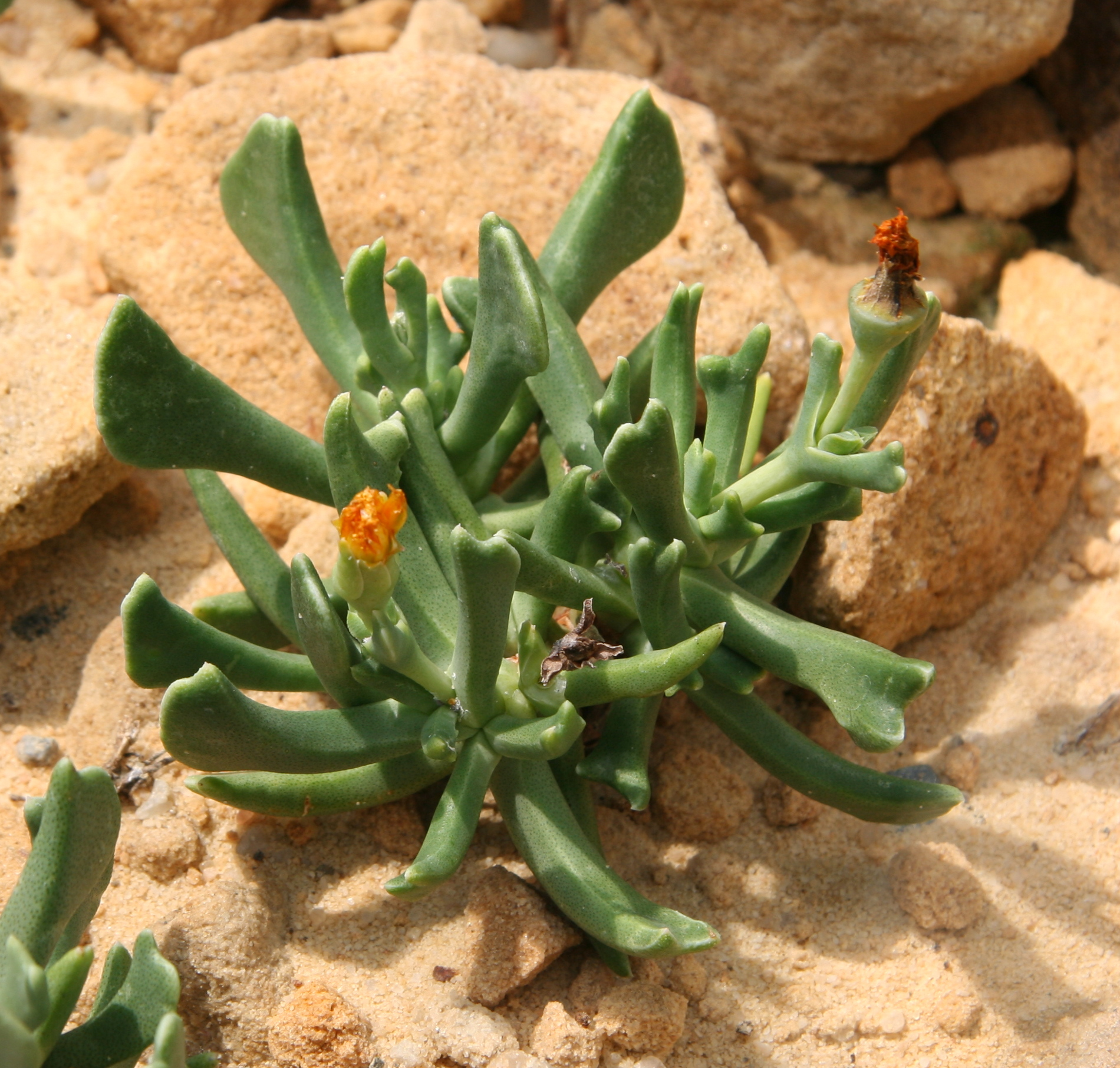 Rhombophyllum dolabriforme im Botanischen Garten Dresden